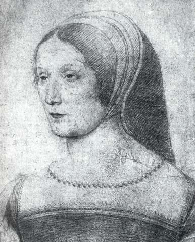 Françoise de Foix, comtesse de Châteaubriant